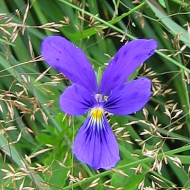 Westfälisches Galmeiveilchen (Viola guestphalica), NSG Bleikuhlen, Lichtenau-Blankenrode, Westfalen, Deutschland.